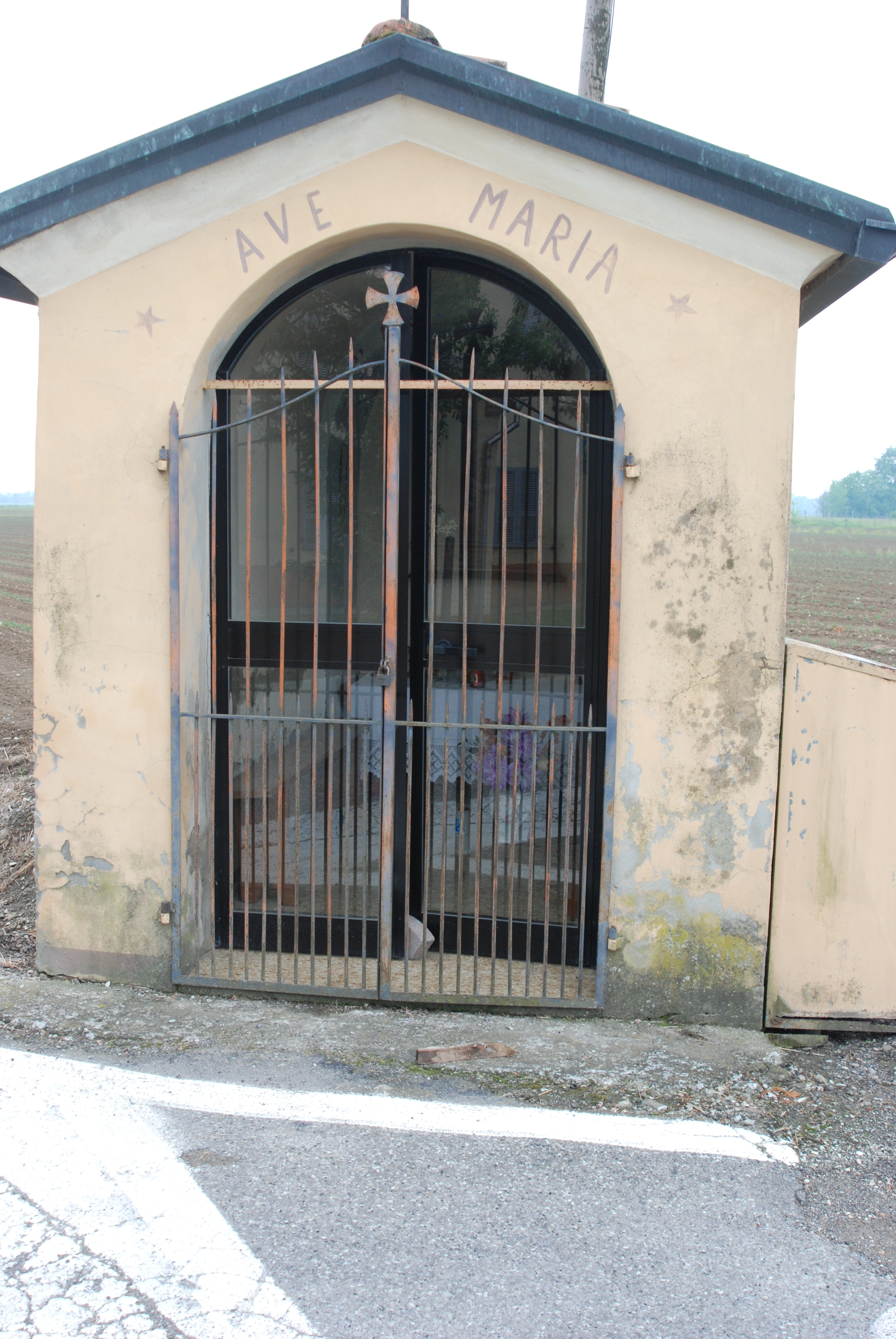 Esterno